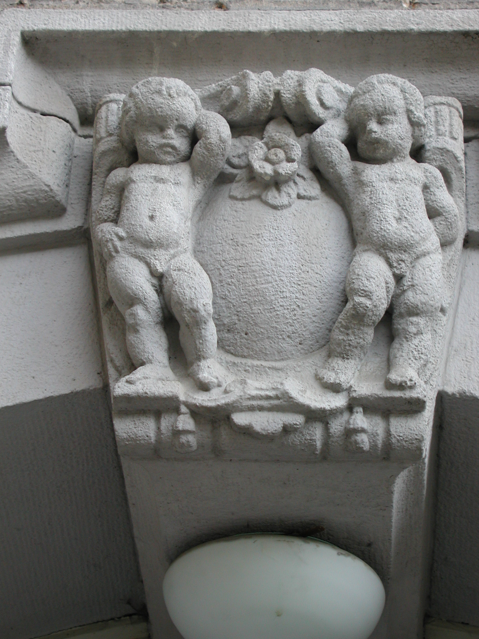 Sandsteinschmuck über dem Eingang des ehemaligen Hauses der Kinder